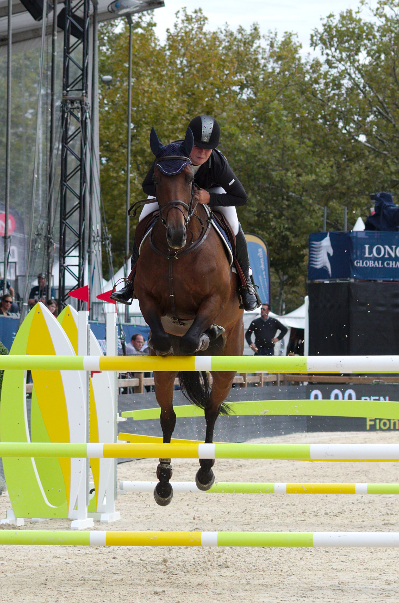 2013 Longines Global Champions - Lausanne - 14-09-2013 - Fiona Meier et Pleiade Heutiere